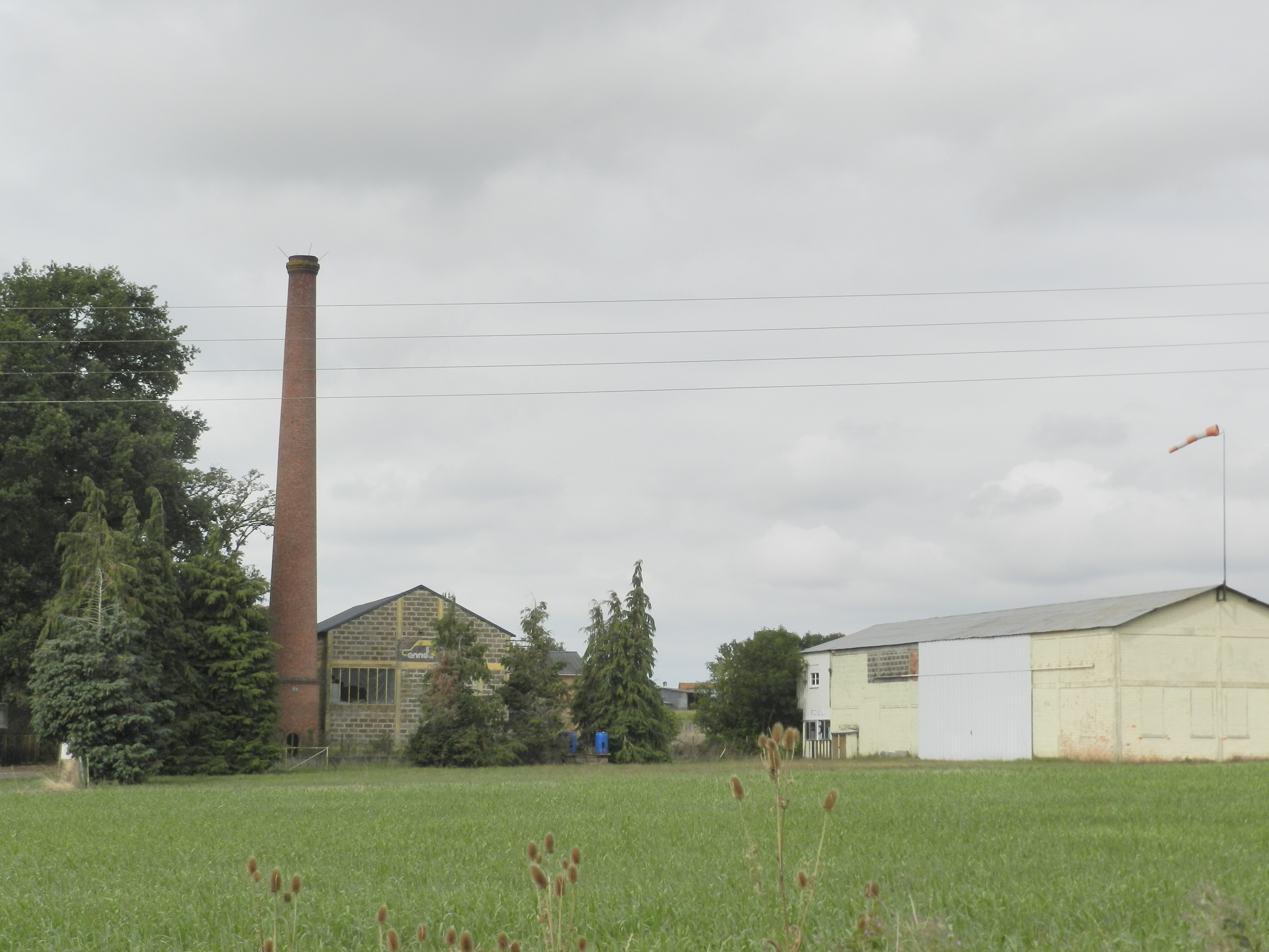 La vieille mine